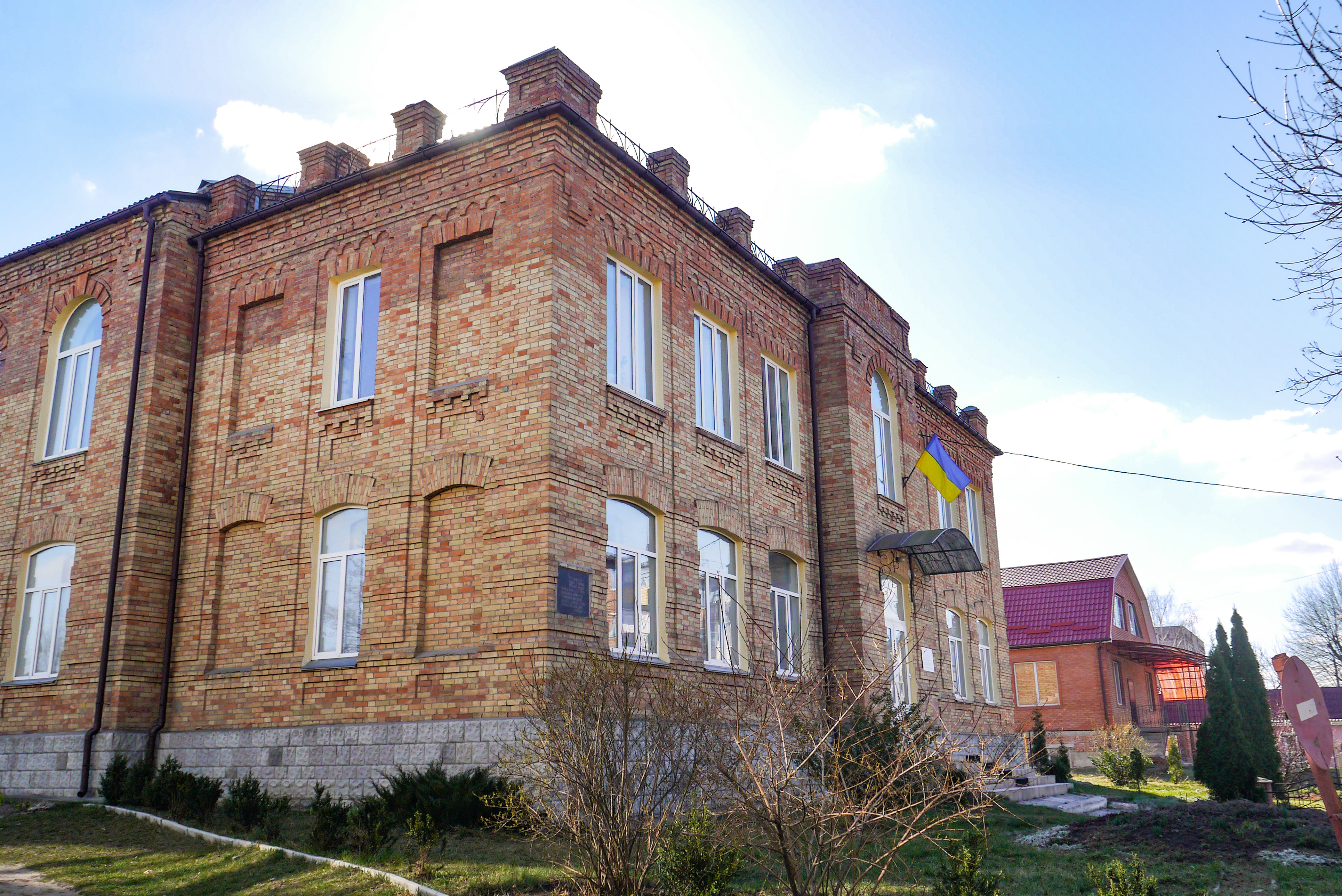 Народне училище, Славута, вул. Козацька, 36